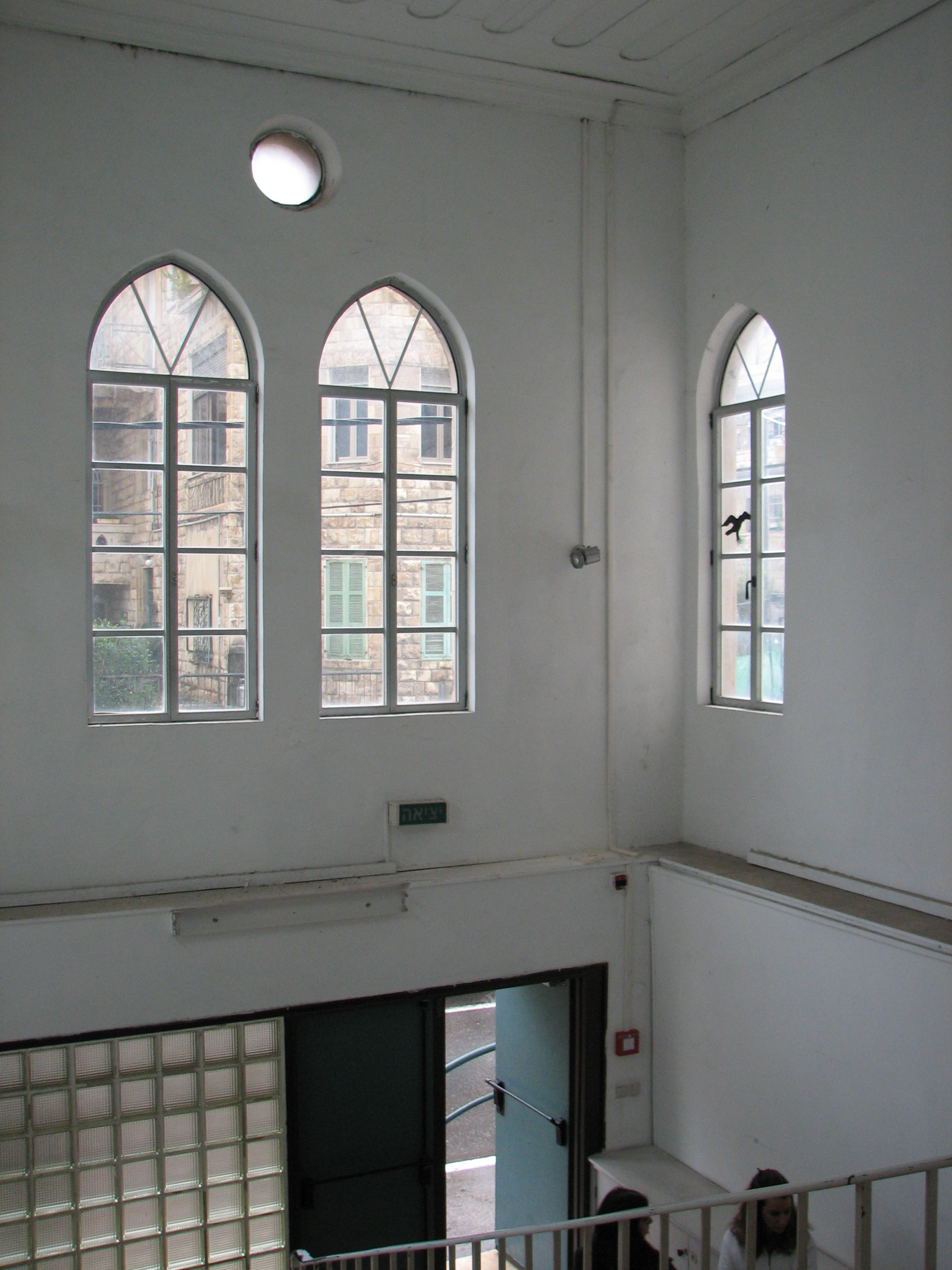 Beth Hagefen' Haifa Israel בית הגפן הוא מרכז ערבי יהודי לתרבות חברה נוער וספורט השוכן בואדי ניסנס בחיפה חדר המדרגות של בית הגפן מבפנים מבט לכוון דרום לרחוב